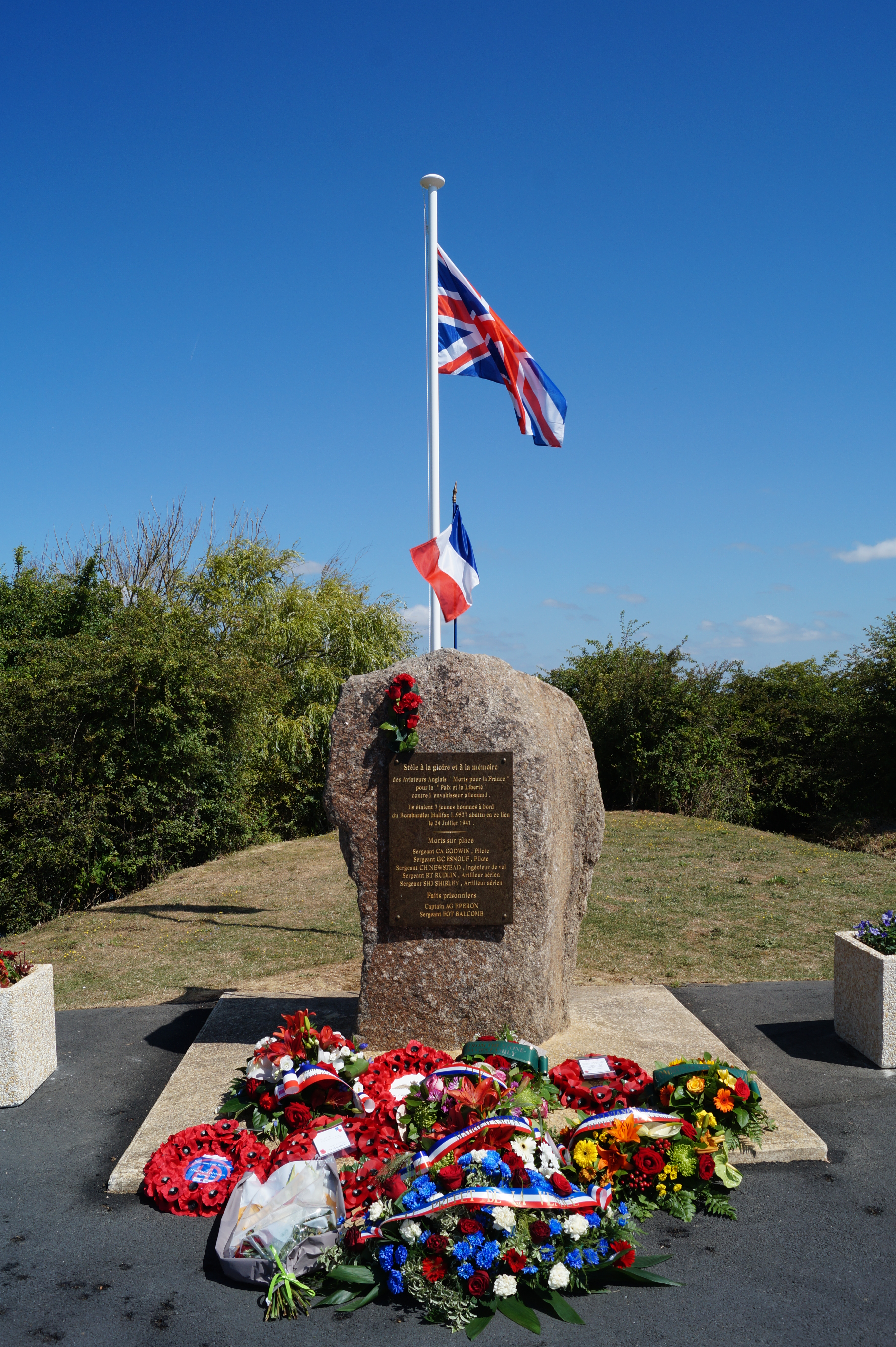 La stèle du Terrier-du-Four depuis la route des Conches.